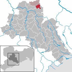 Zschaitz-Ottewig in Saxony - district Mittelsachsen